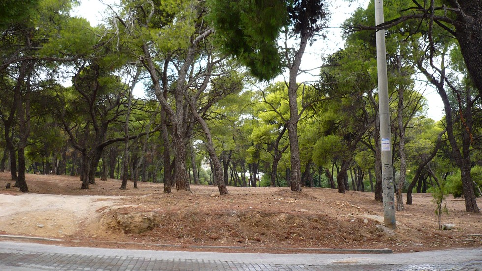 kasdali forest